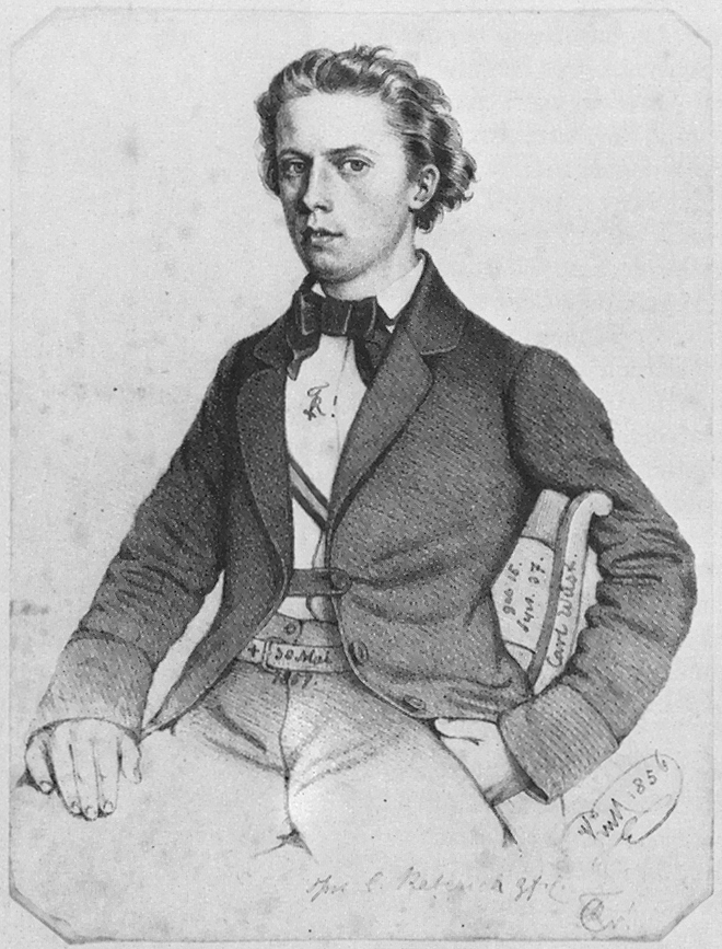 Porträt von Carl Wüst (eines Mitglieds der Tübinger Königsgesellschaft Roigel, † 1857)